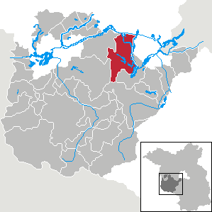 Werder (Havel) in Brandenburg (Country) - District Potsdam-Mittelmark